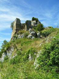 Außenansicht Burg Roquefixade